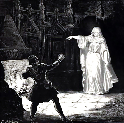 Apparition de la dame blanche dans l'opéra éponyme